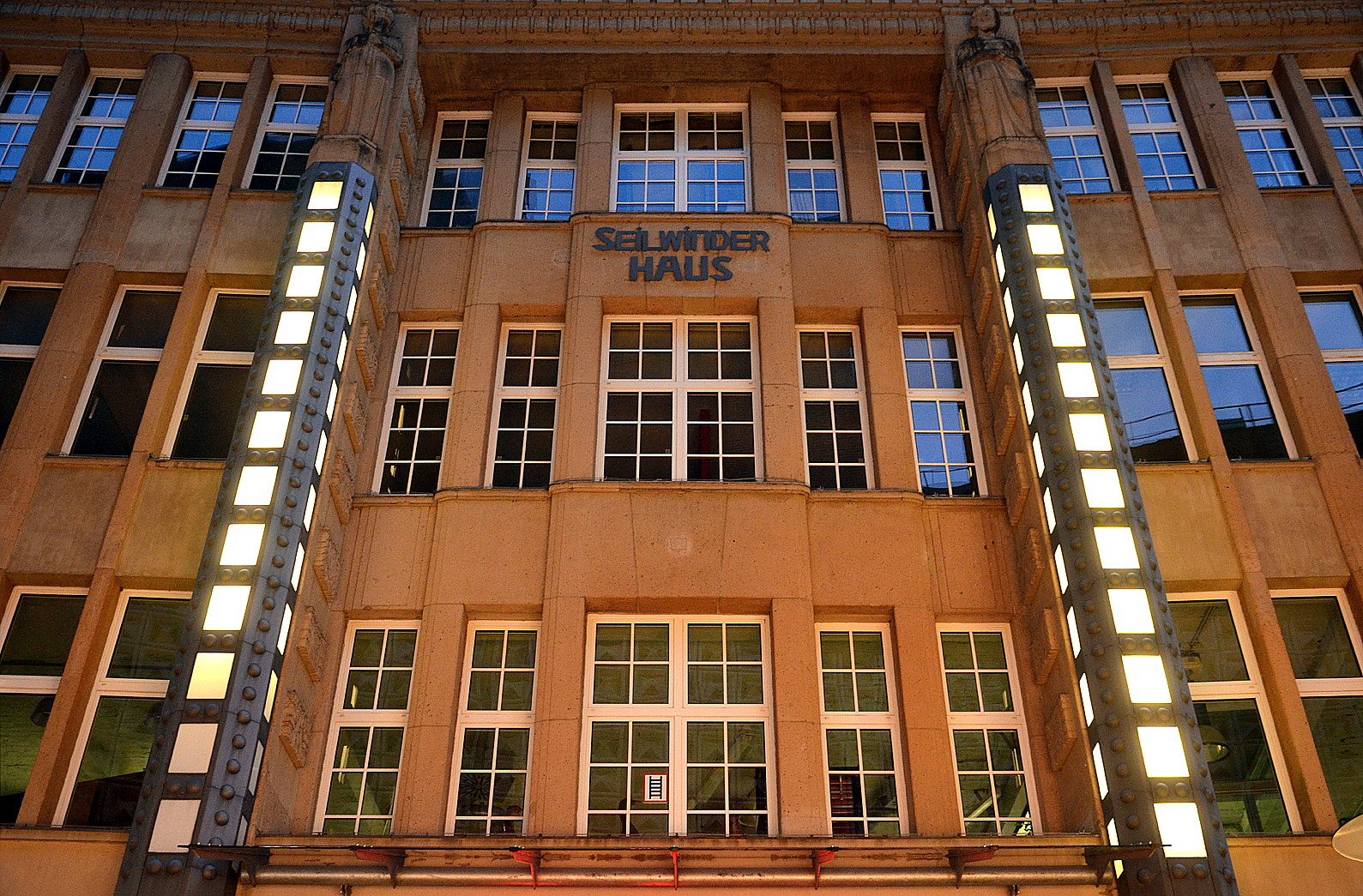 Detail der denkmalgerecht wieder hergestellten Fassade des Seilwinderhauses in Hannover ...